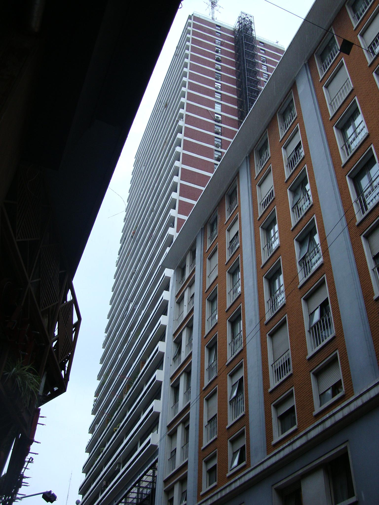 Vista de la Torre Tucumán de la Galería Jardín, en la calle Tucumán casi Florida. Barrio de San Nicolás, ciudad de Buenos Aires, Argentina.